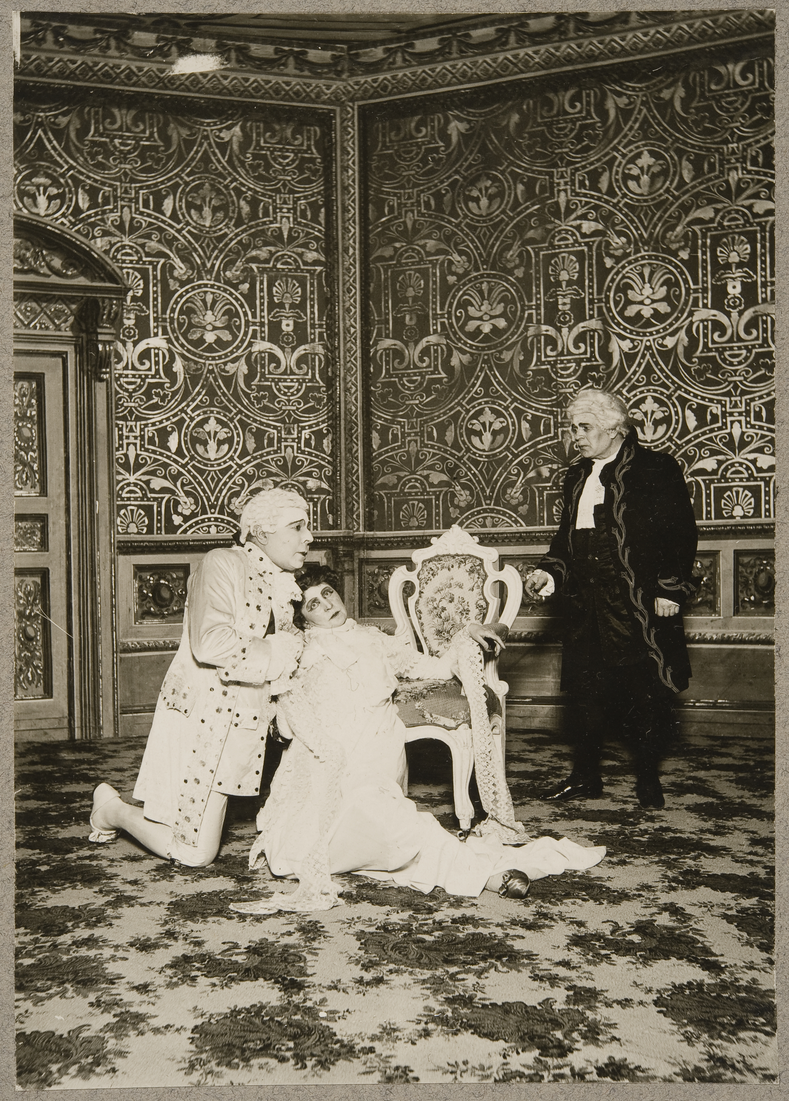 Eugène Scribe: Adrienne Lecouvreur - näyttelijät Axel Ahlberg, Ida Aalberg & Hemmo Kallio. Suomen Kansallisteatteri 1910-luvun alussa.